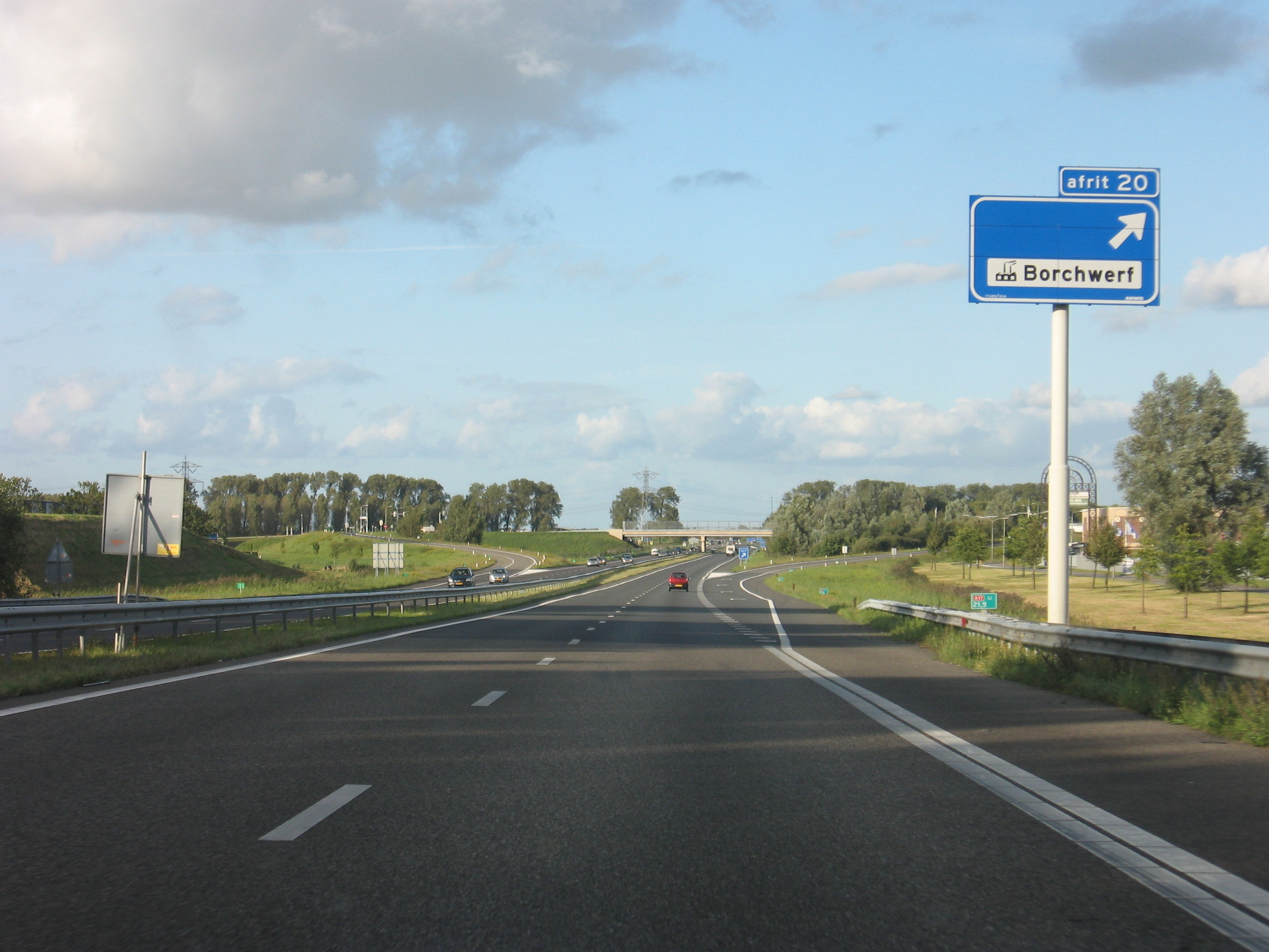 Rijksweg 17 afrit 2